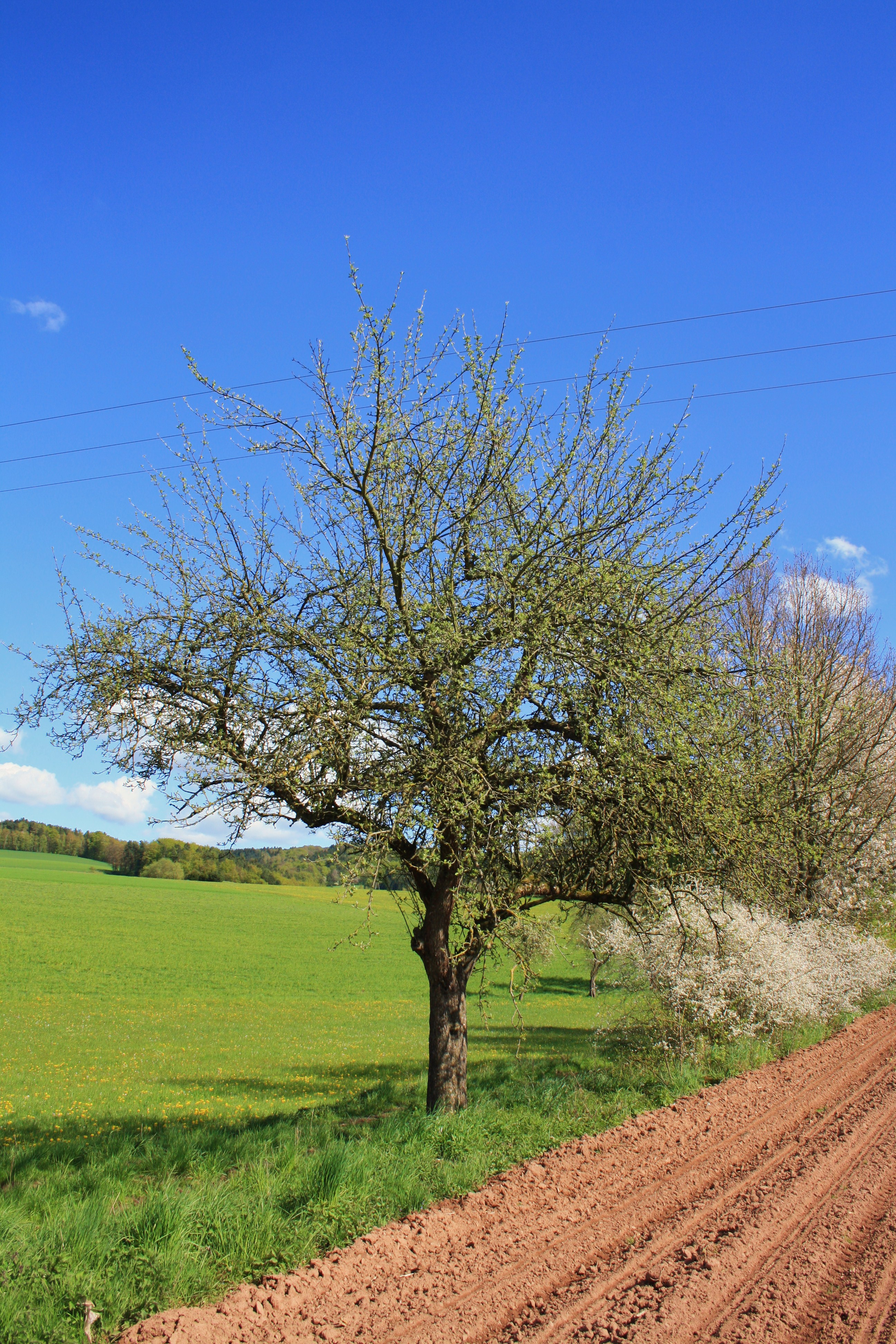 Streuobstbaum, Apfelbaum, Sorte Kaiser Wilhelm; Landschaftsschutzgebiet „Hessische Rhön“